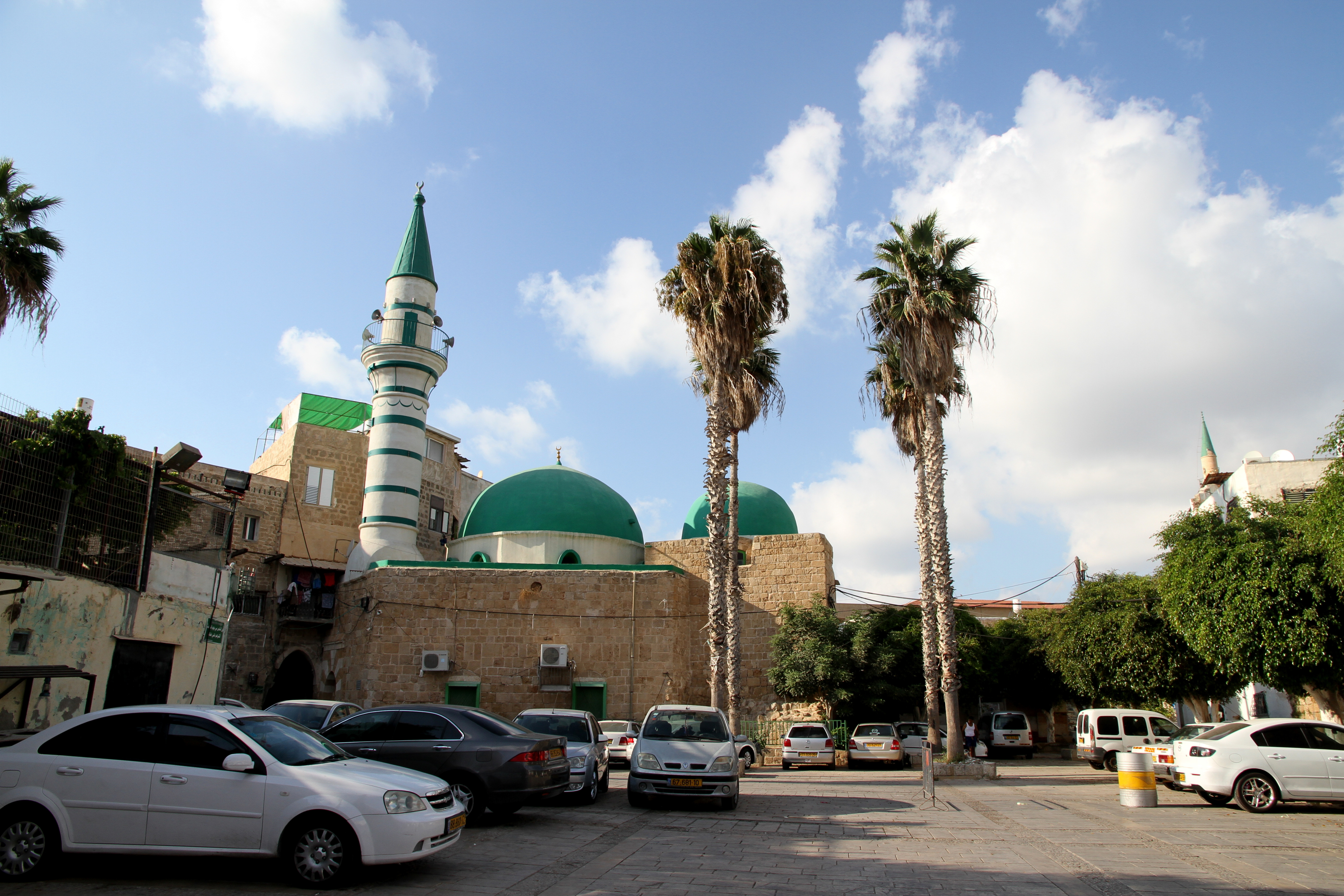 Acre